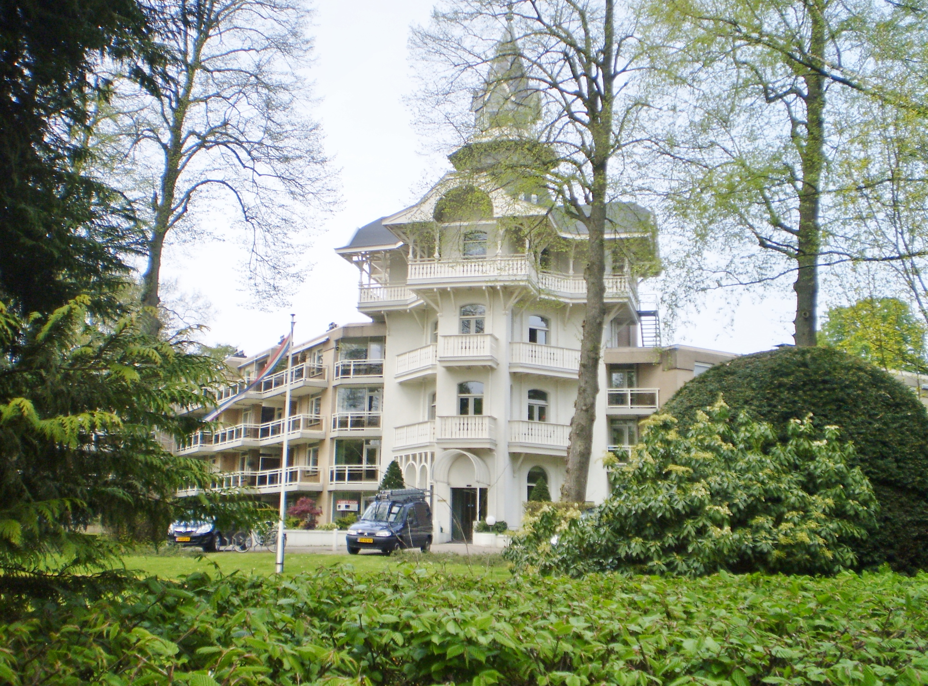 centrale deel is van het oude badhotel